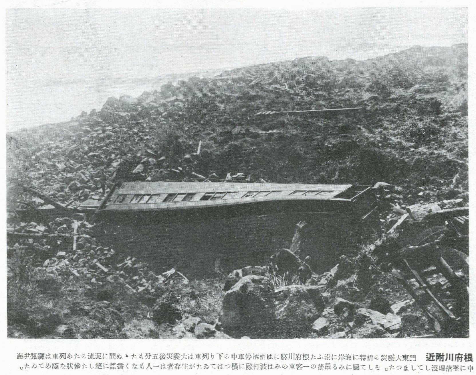 関東大震災の際に根府川駅から海中に落ちた列車のうち、海岸に残った客車の1両。右下に台車がある。関東大震災についての扱いは小さい本なので、記述には誤りがある可能性がある。